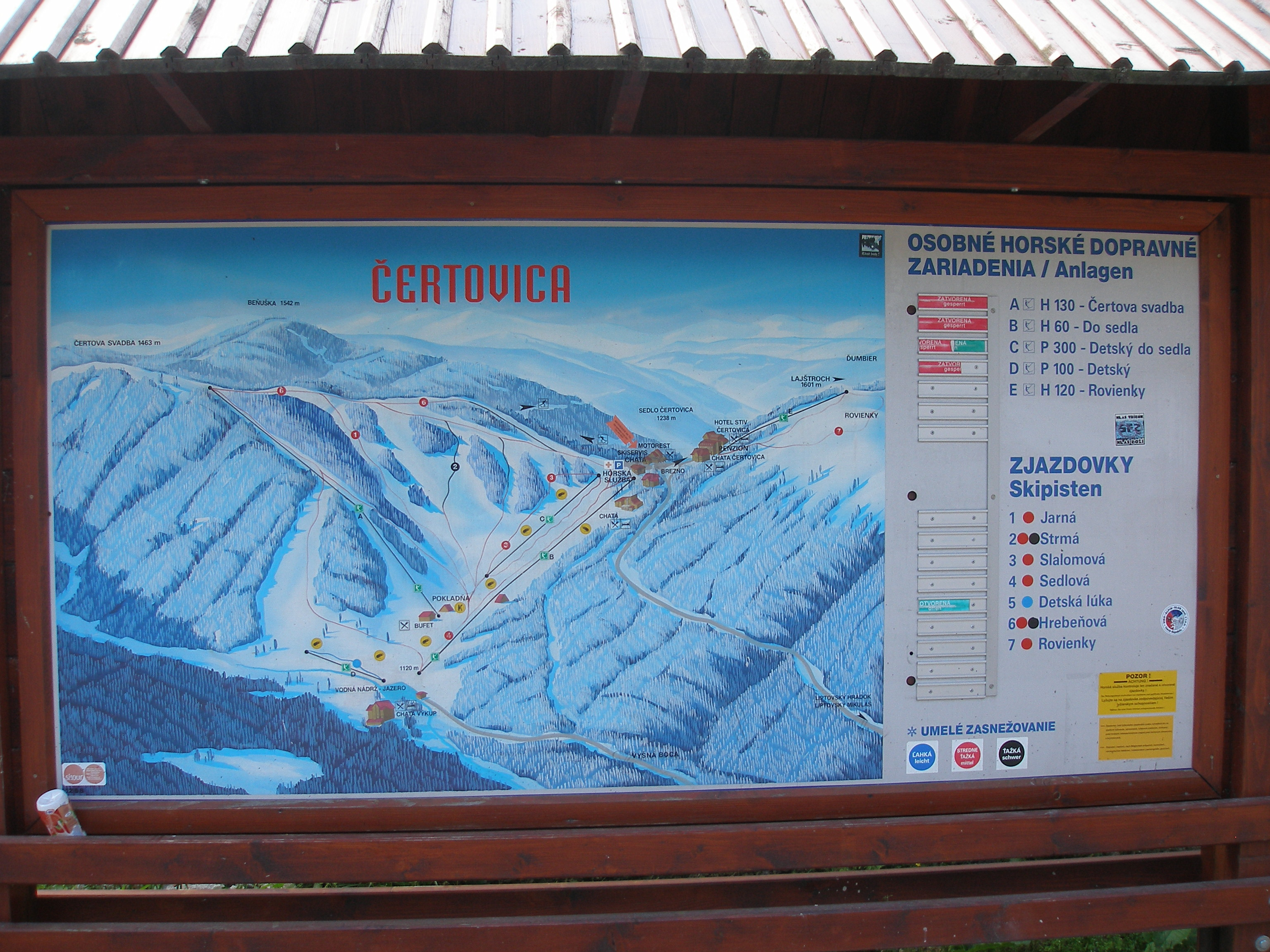 Turistické stredisko a horský priechod Čertovica. Nízke Tatry.